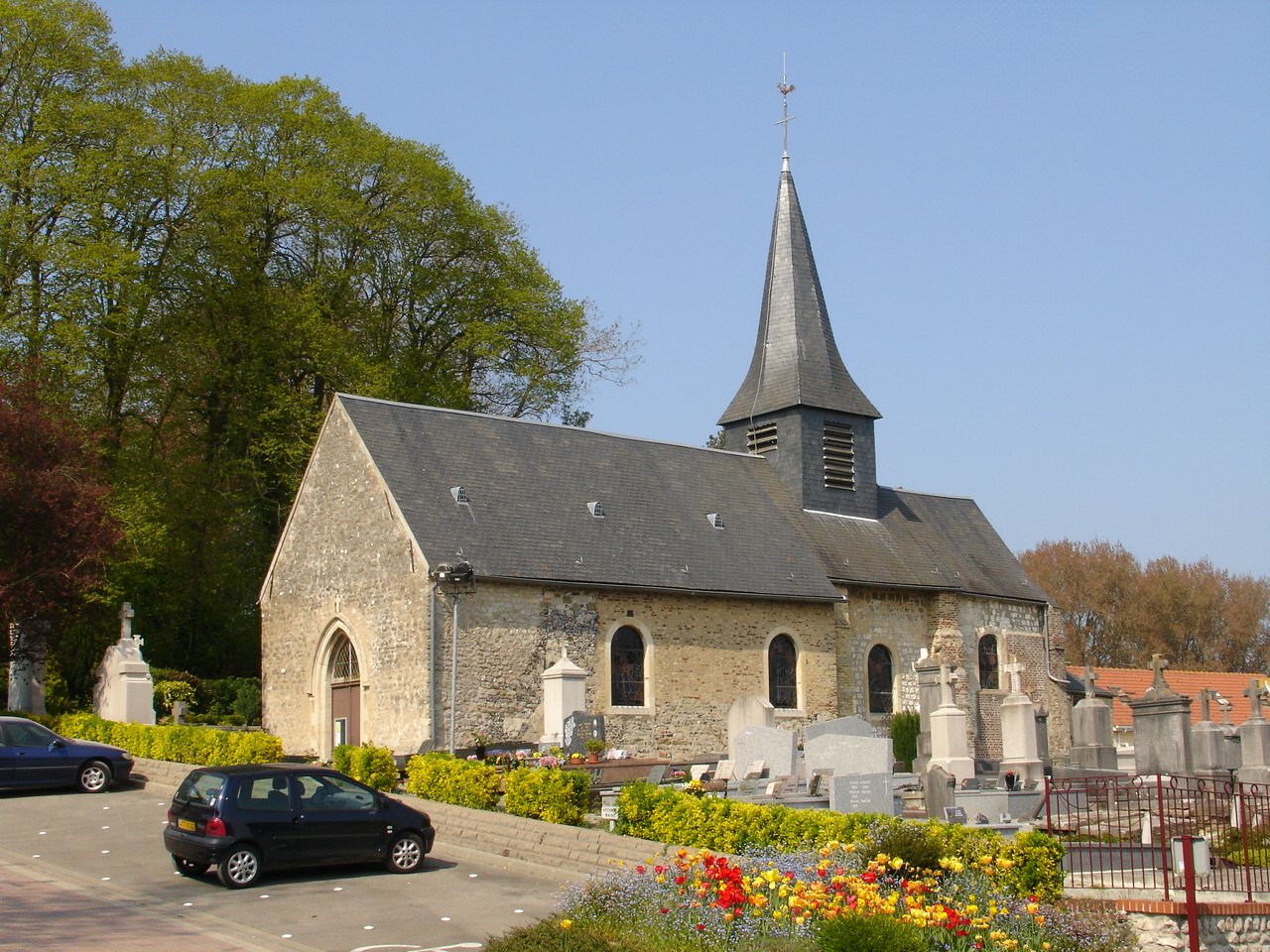 Église de Bonningues-lès-Calais